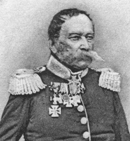 Karl Friedrich Erdmann von Kracht (* 19. April 1776 in Helmsdorf (Kreis Sorau); † 9. September 1856 in Charlottenburg) war königlich preußischer Generalleutnant und zuletzt Kommandeur des 3. Ulanen-Regiments, hier als Kommandeur Ulanen-Regiment "Großherzog Friedrich von Baden" (Rheinisches) Nr. 7